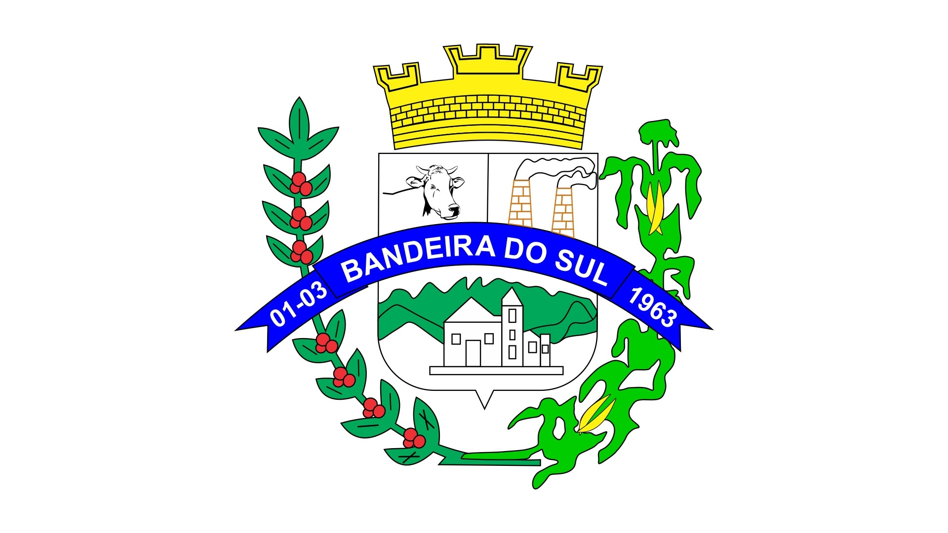 Bandeira de Bandeira do Sul